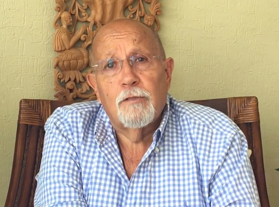 Polo Polo en 2016